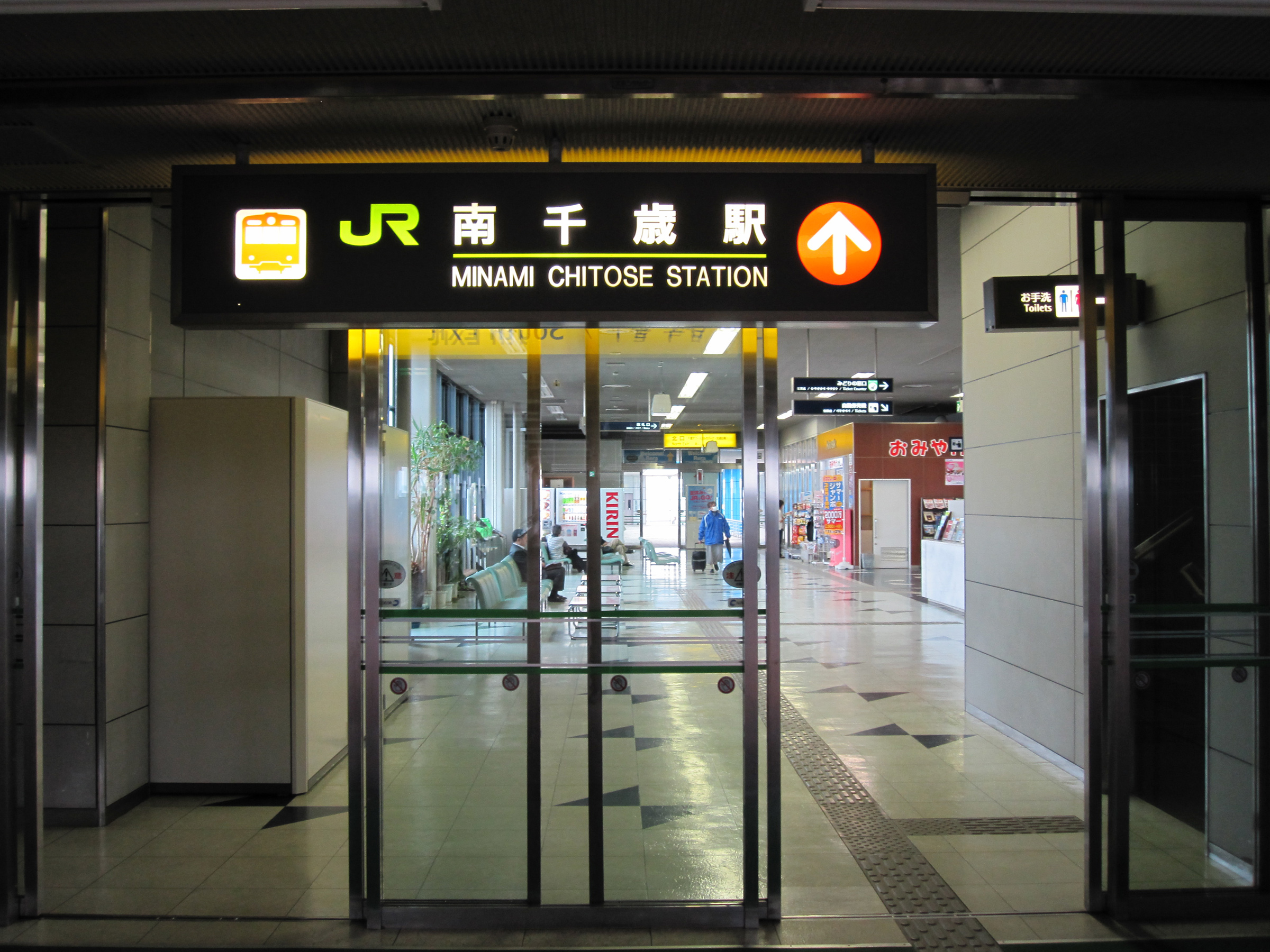 南千歳駅ペデストリアンデッキからの入口（JR北海道）